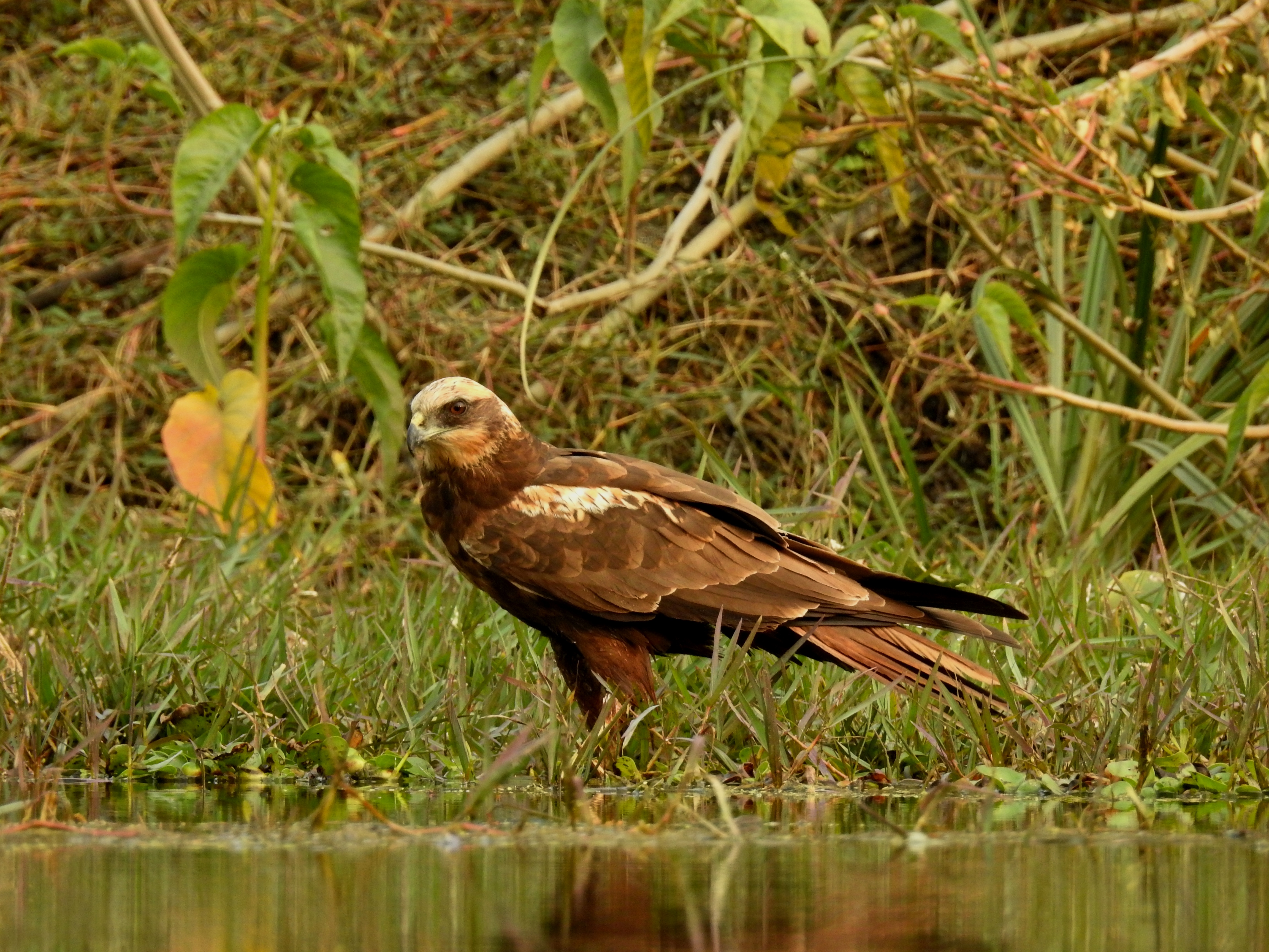 मराठी नाव: दलदली भोवत्या, दलदली हारिण